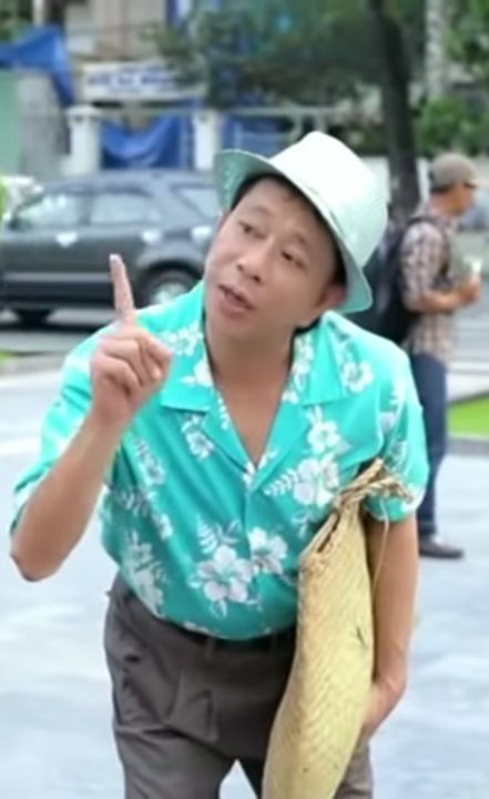 Ở nhà quê mới lên Bảo Chung, ảnh chụp màn hình từ video của Danh Hài Bảo Chung (screen capture from video of Danh Hài Bảo Chung)